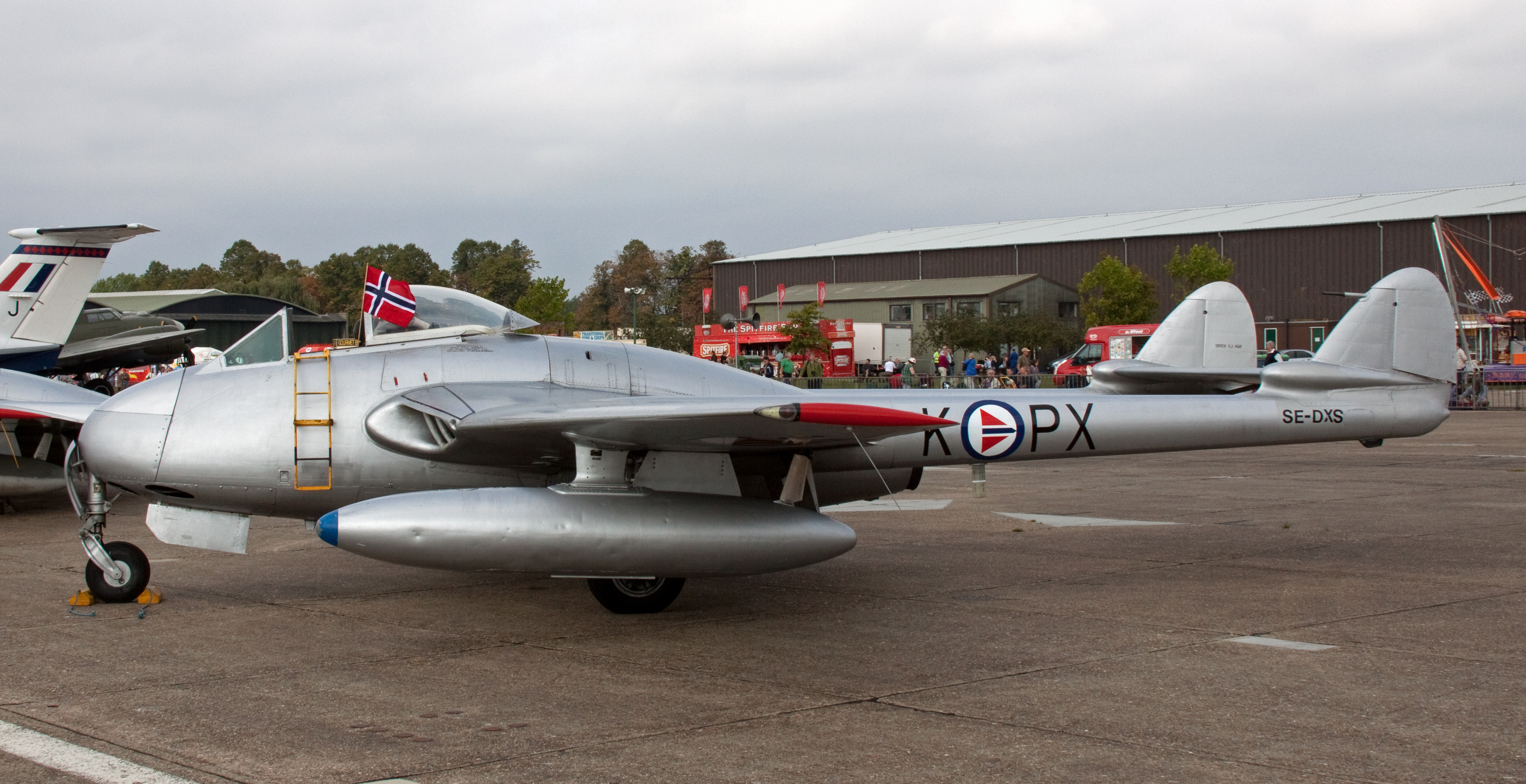 Norwegian Vampire SE-DXS